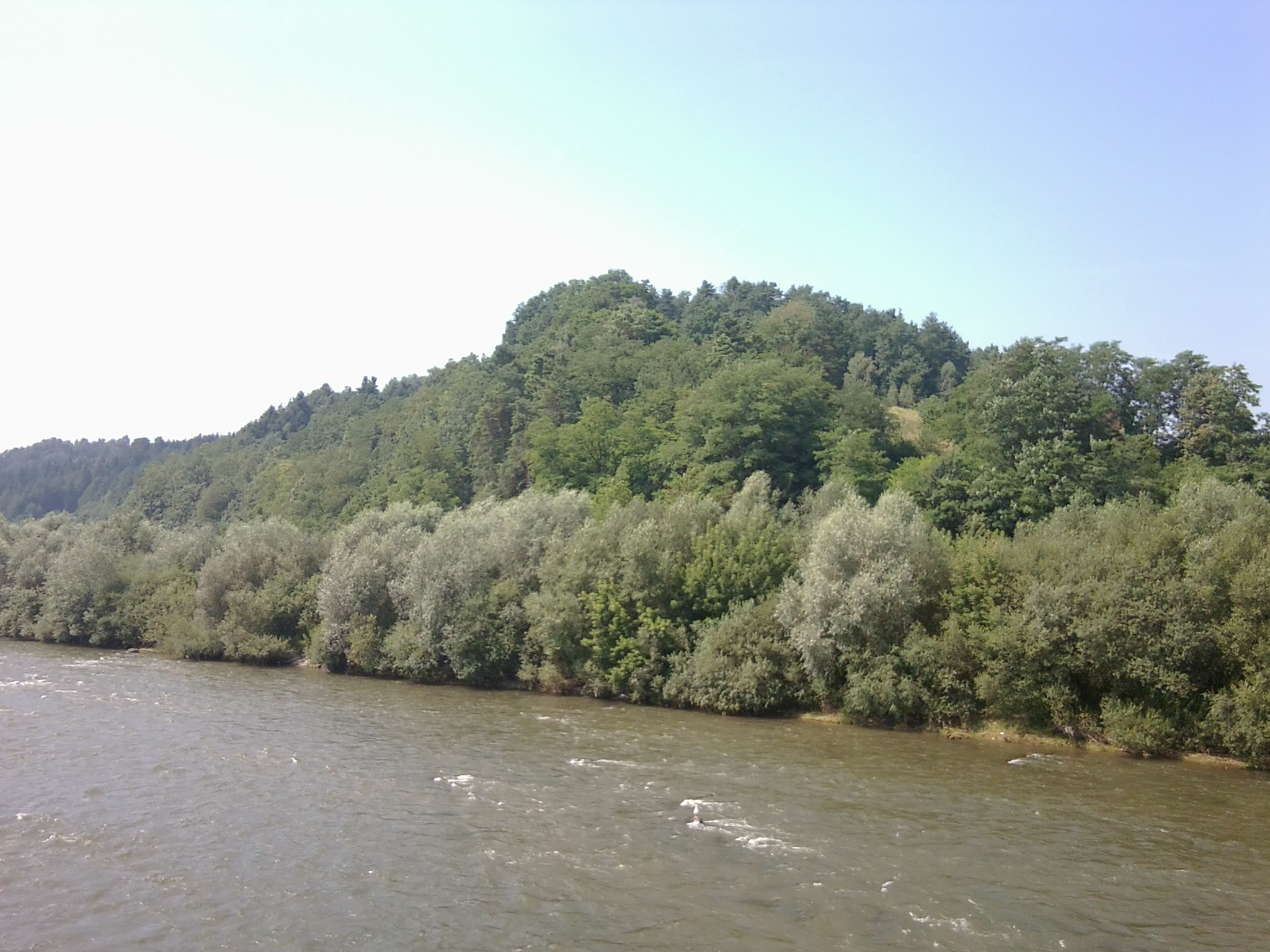 Wzgórze grodowe w Naszacowicach